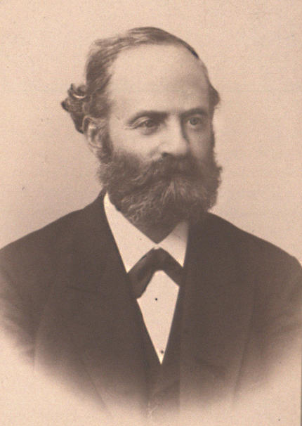 Moos, Salomon